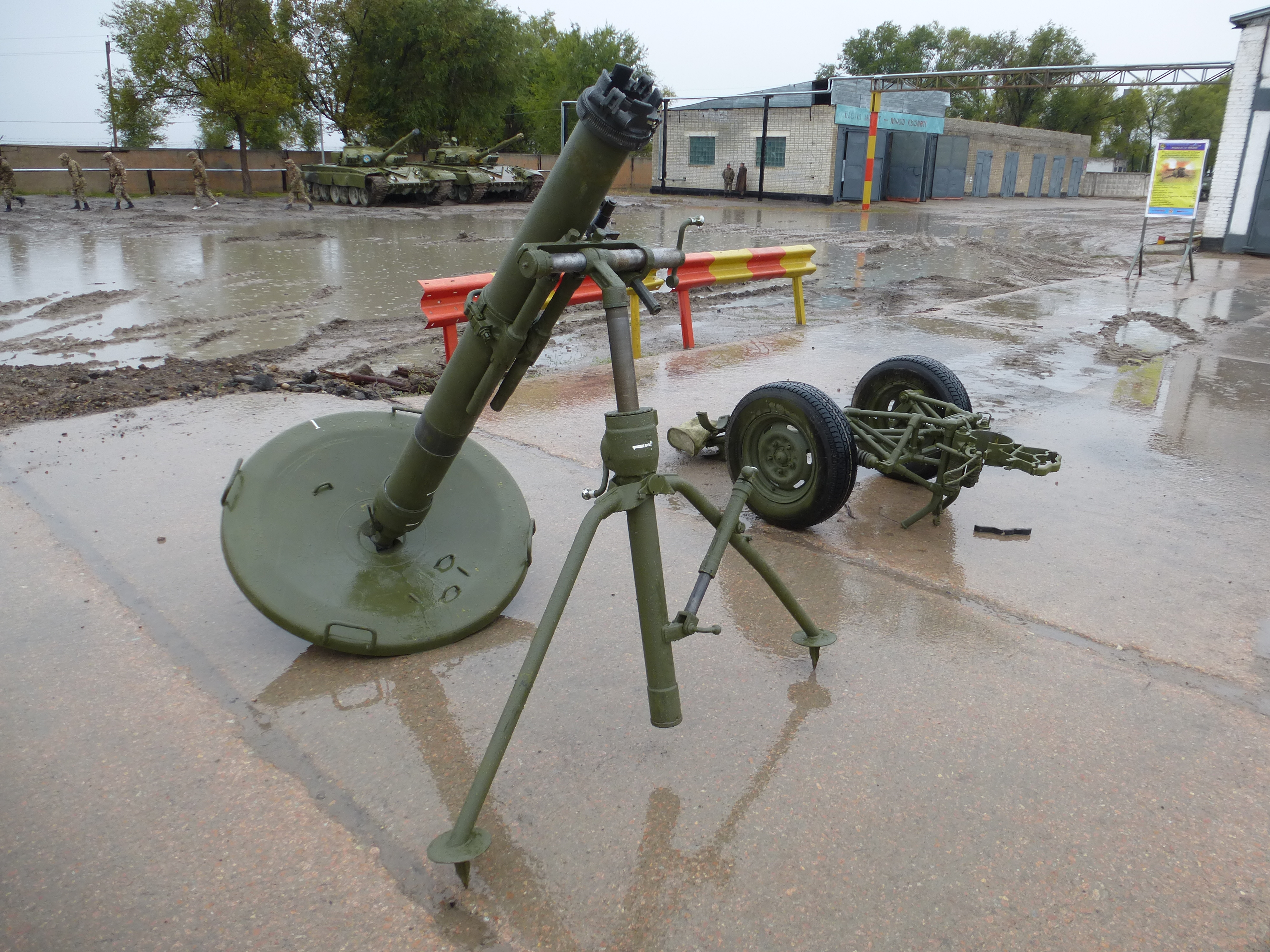 Миномёт 2Б11 с учебного полигона Алматинского Института Сухопутных Войск